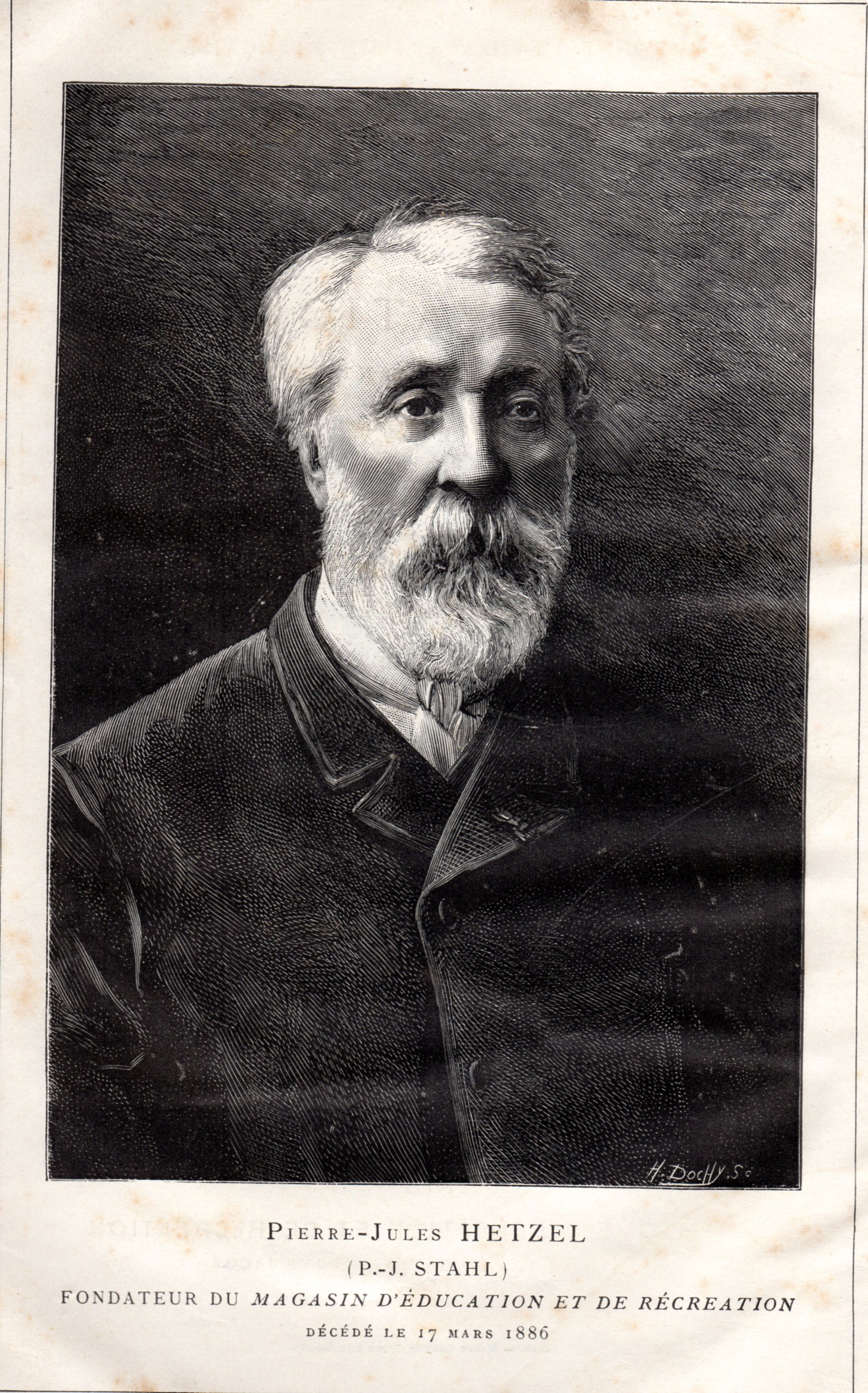 Portrait de Pierre-Jules Hetzel, publié dans le Magasin d'éducation et de récréation, la revue qu'il a créée, lors de son décès en 1886.